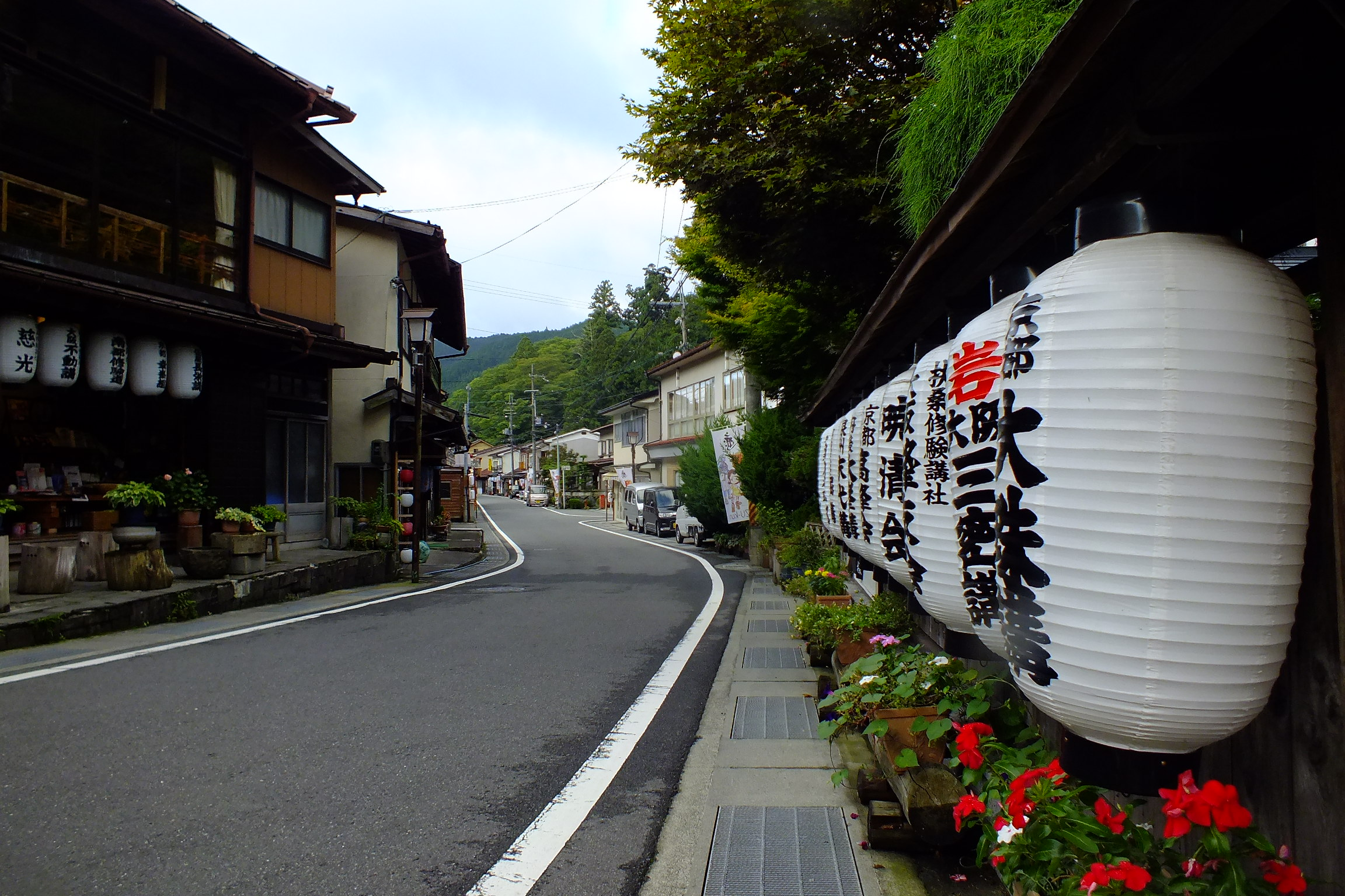 2016-09-09 Dorogawa-Onsen, Tenkawa, Nara,洞川温泉